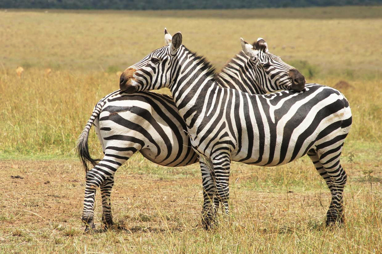 500px provided description: SONY DSC